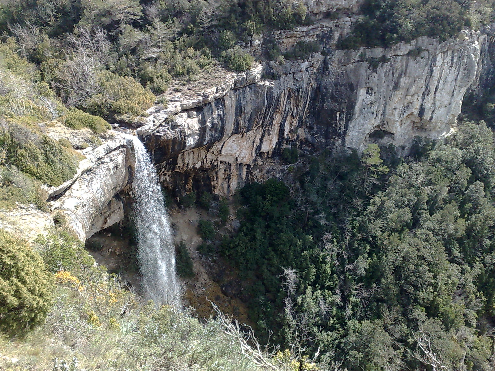 Cascada activa en periodos húmedos This is a photography of a Special Area of Conservation in Spain with the ID: ES5140008. Natura2000 entry, EEA entry